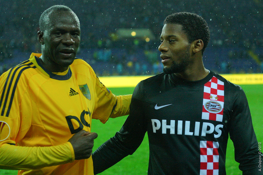 Jeremain Lens